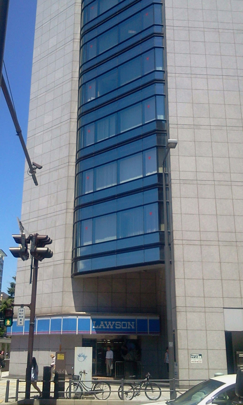 第四銀行横浜支店が入っているビル